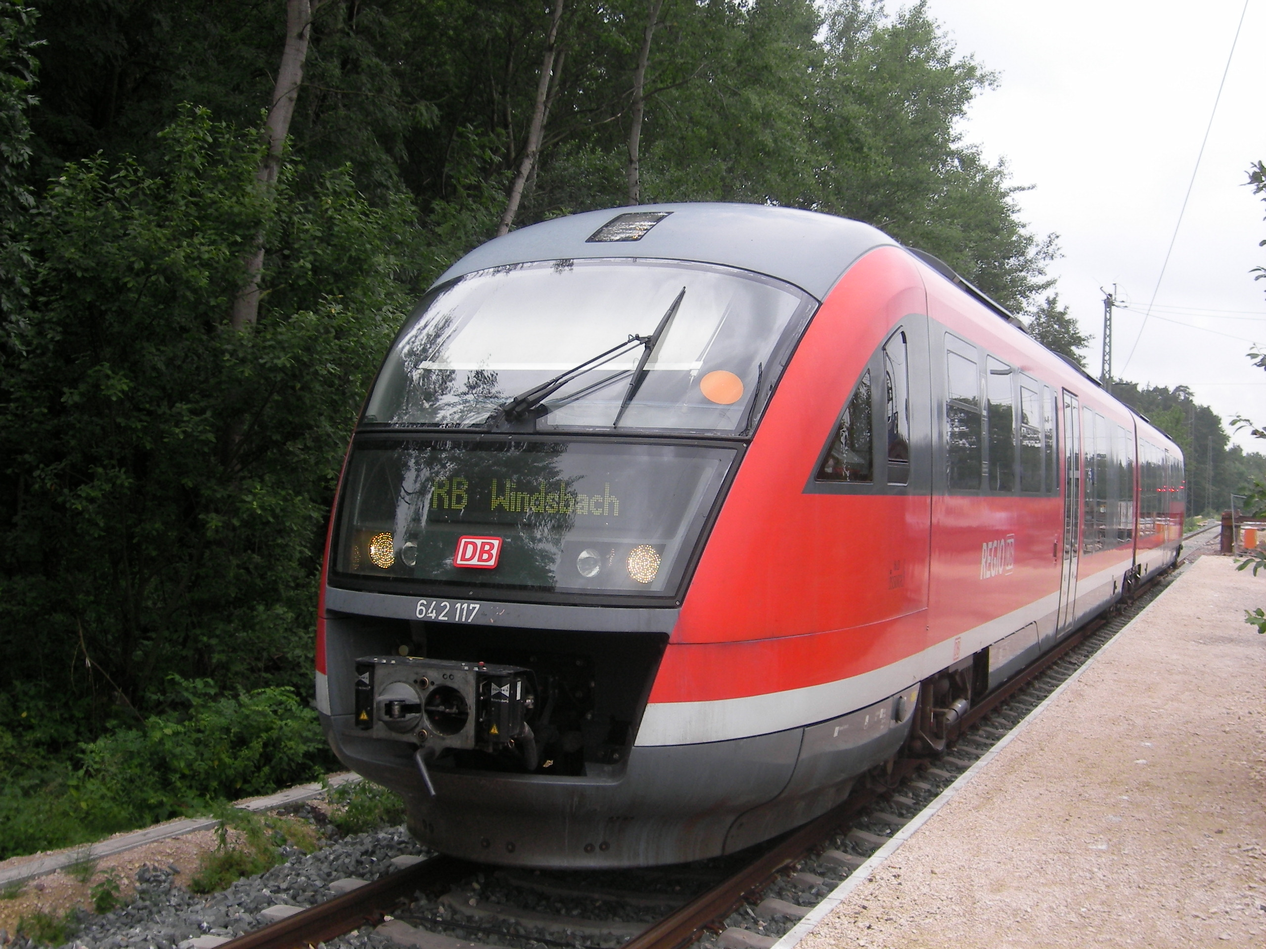 Ein Zug der Baureihe 642 in Wicklesgreuth